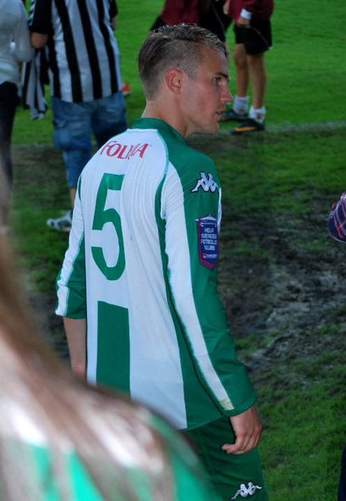 Match against Landskrona BoIS 2/8 - 2011